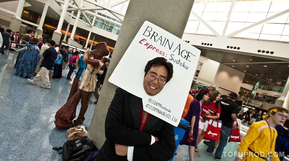 Anime Expo 2010，《Brain Age Express: Sudoku》標題畫面Ryuta Kawashima cosplayer。